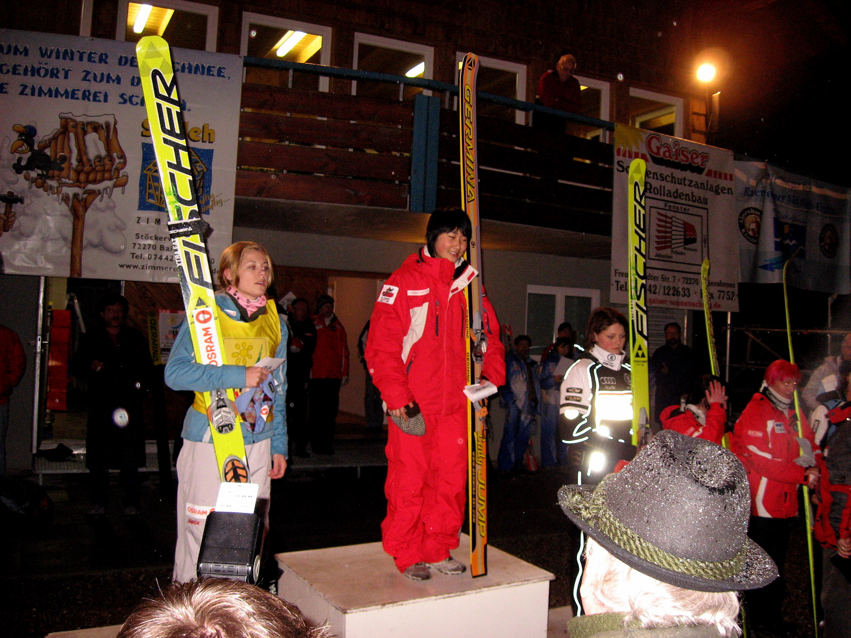 Victory ceremony at Ladies COC ski jumping in Baiersbronn (GER) 2008 (Anette Sagen, Atsuko Tanaka, Carina Vogt, Jaqueline Seifriedsberger, Daniela Iraschko)